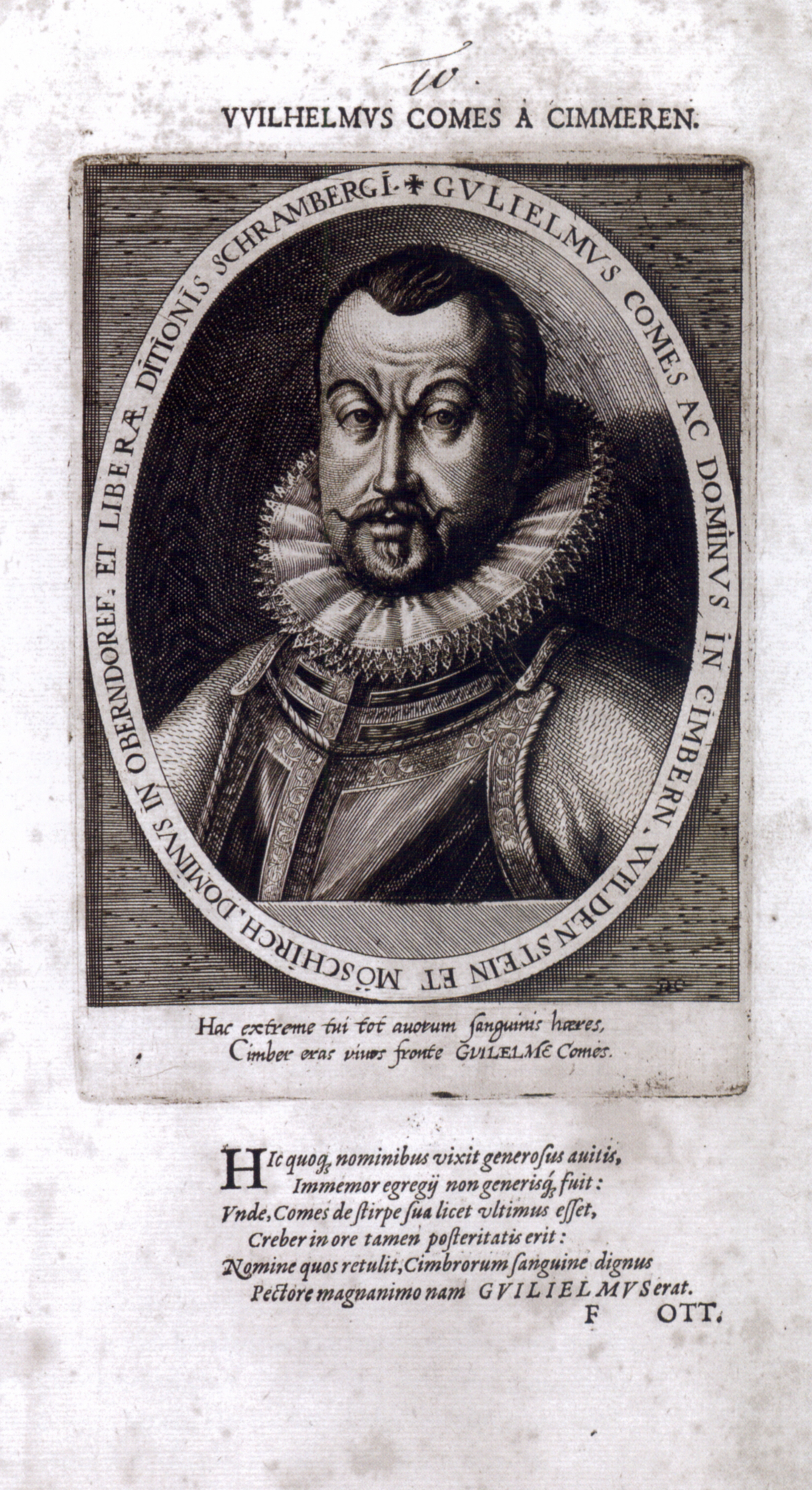 Dominicus Custos: Wilhelm von Zimmern, der letzte Graf von Zimmern (aus: Atrium heroicum Caesarum, regum... 1600–1602)